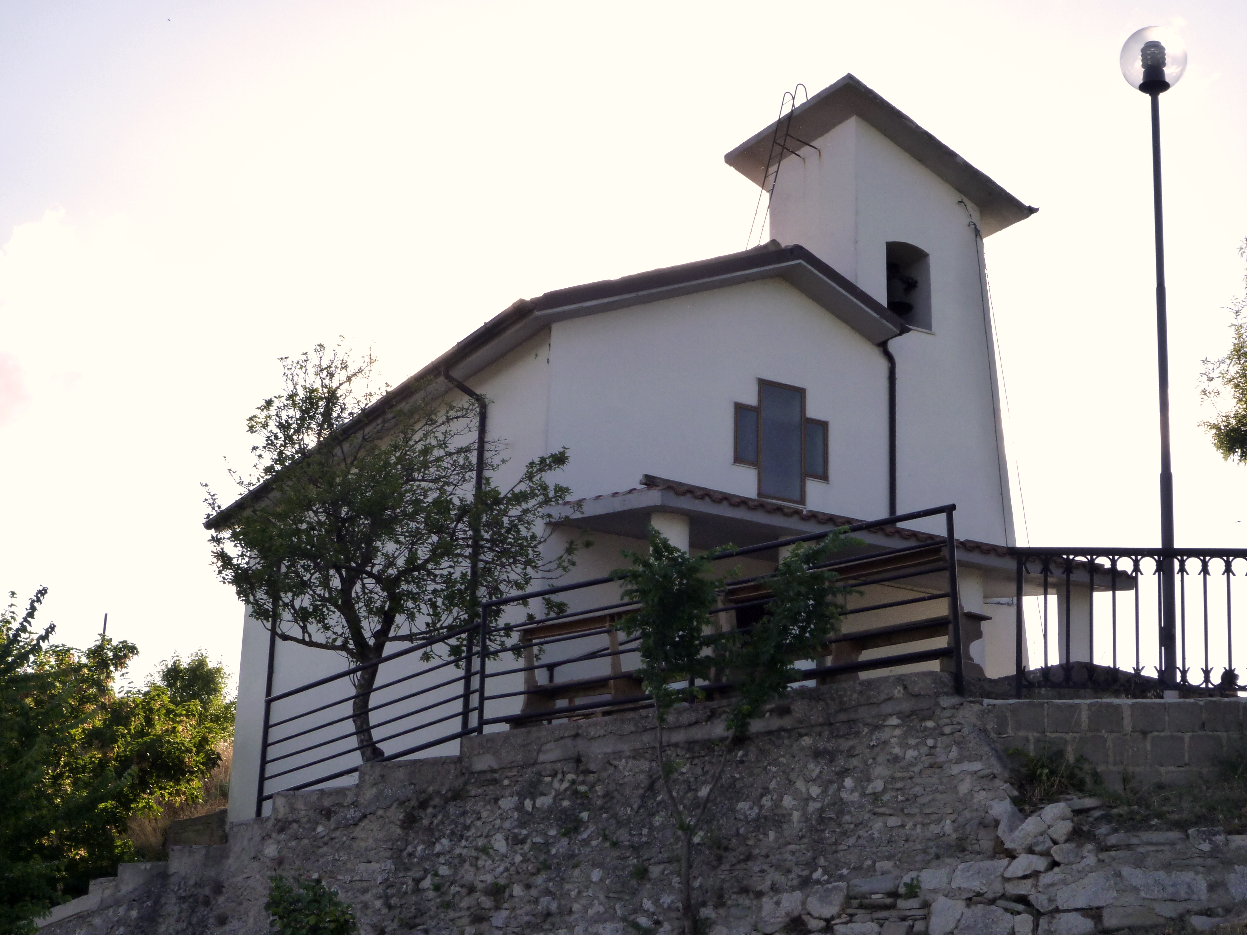 Chiesa dell'Annunziata, Civitaluparella, Chieti.